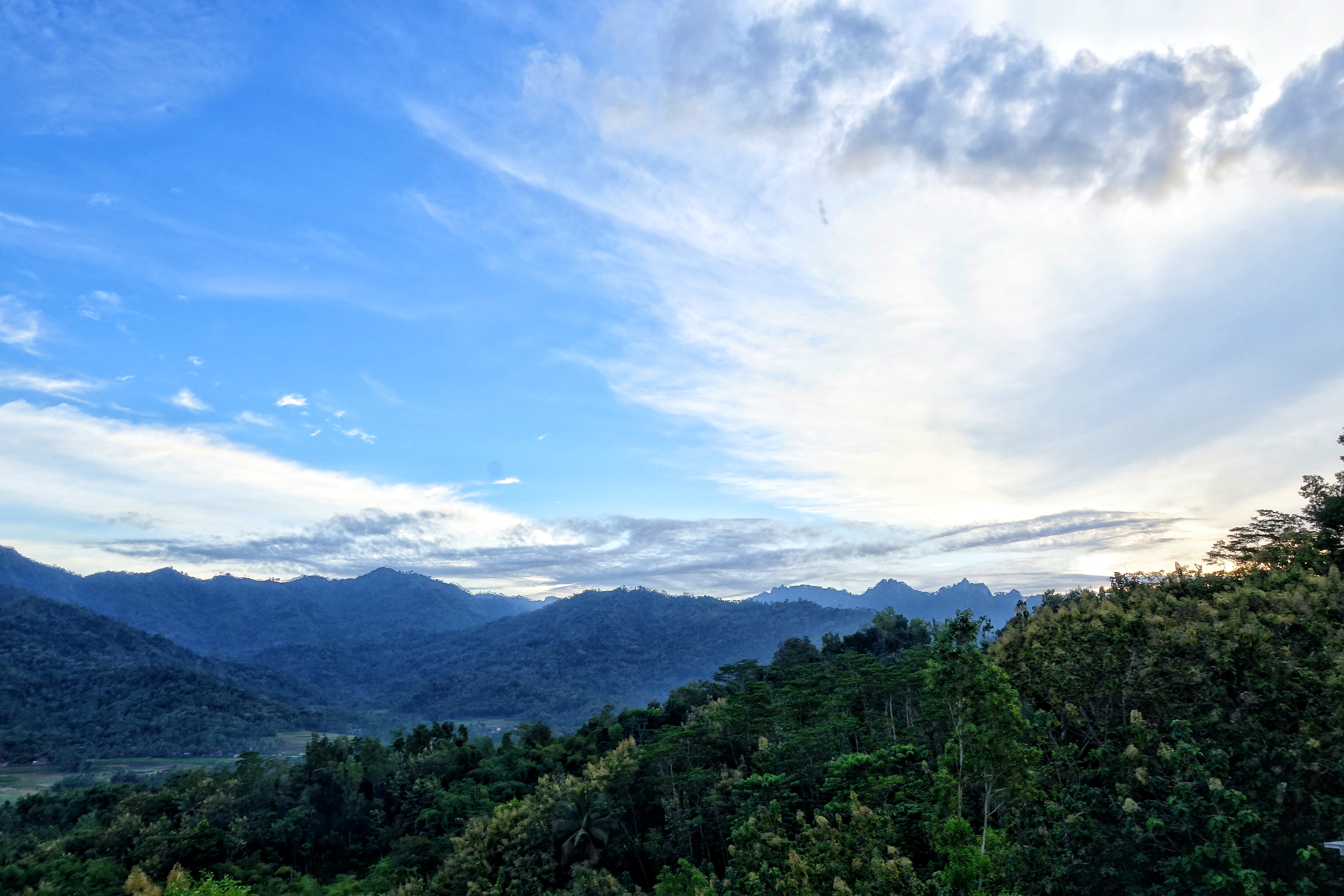 Foto ini diambil dari Gereja Ayam.